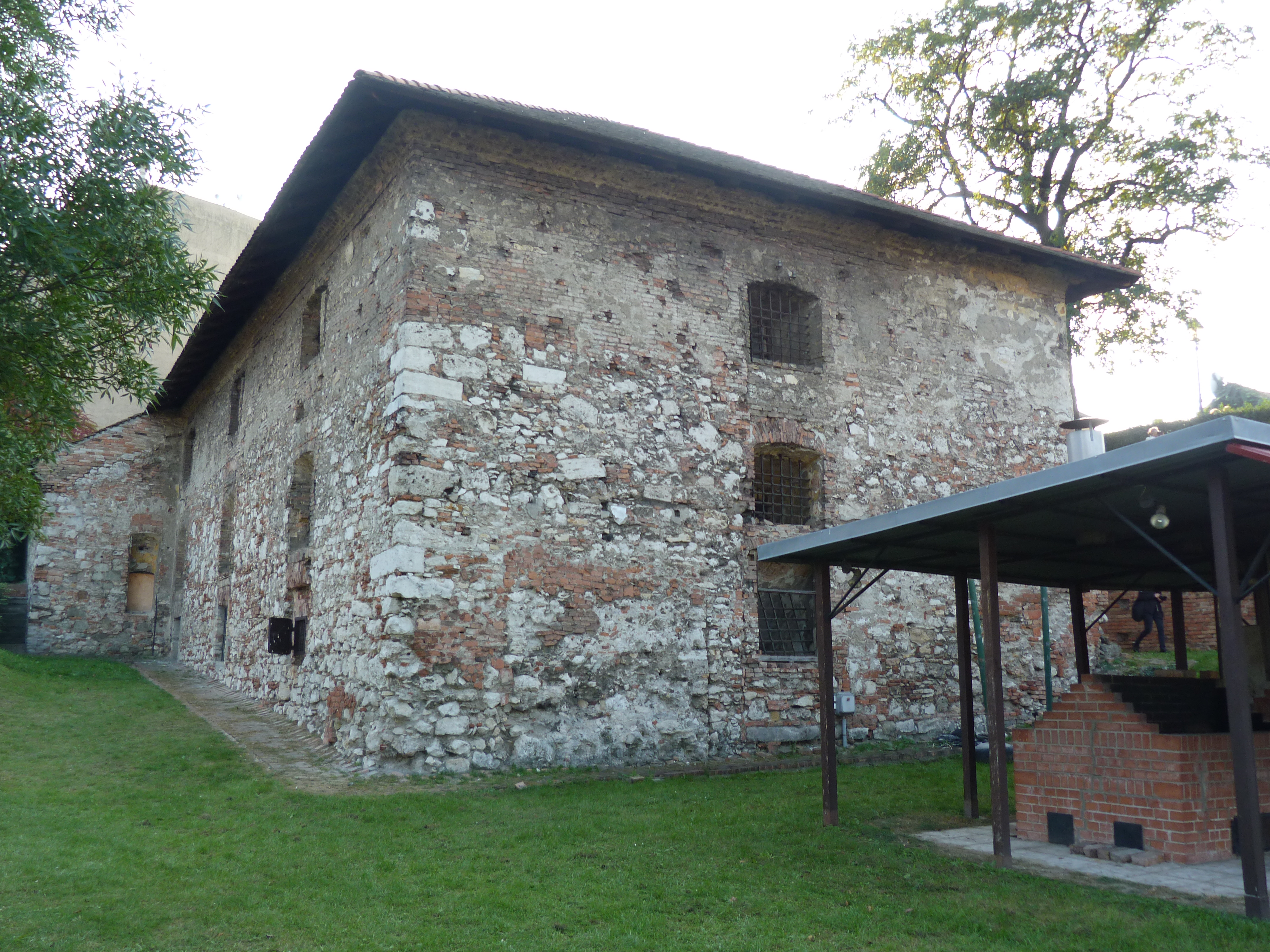 A felvétel 2014. október 5-én készült Budapesten. Buda, Táncsics Mihály utca 9 szám. A Királyi Pénzverő Ház. Erdélyi Bástya.